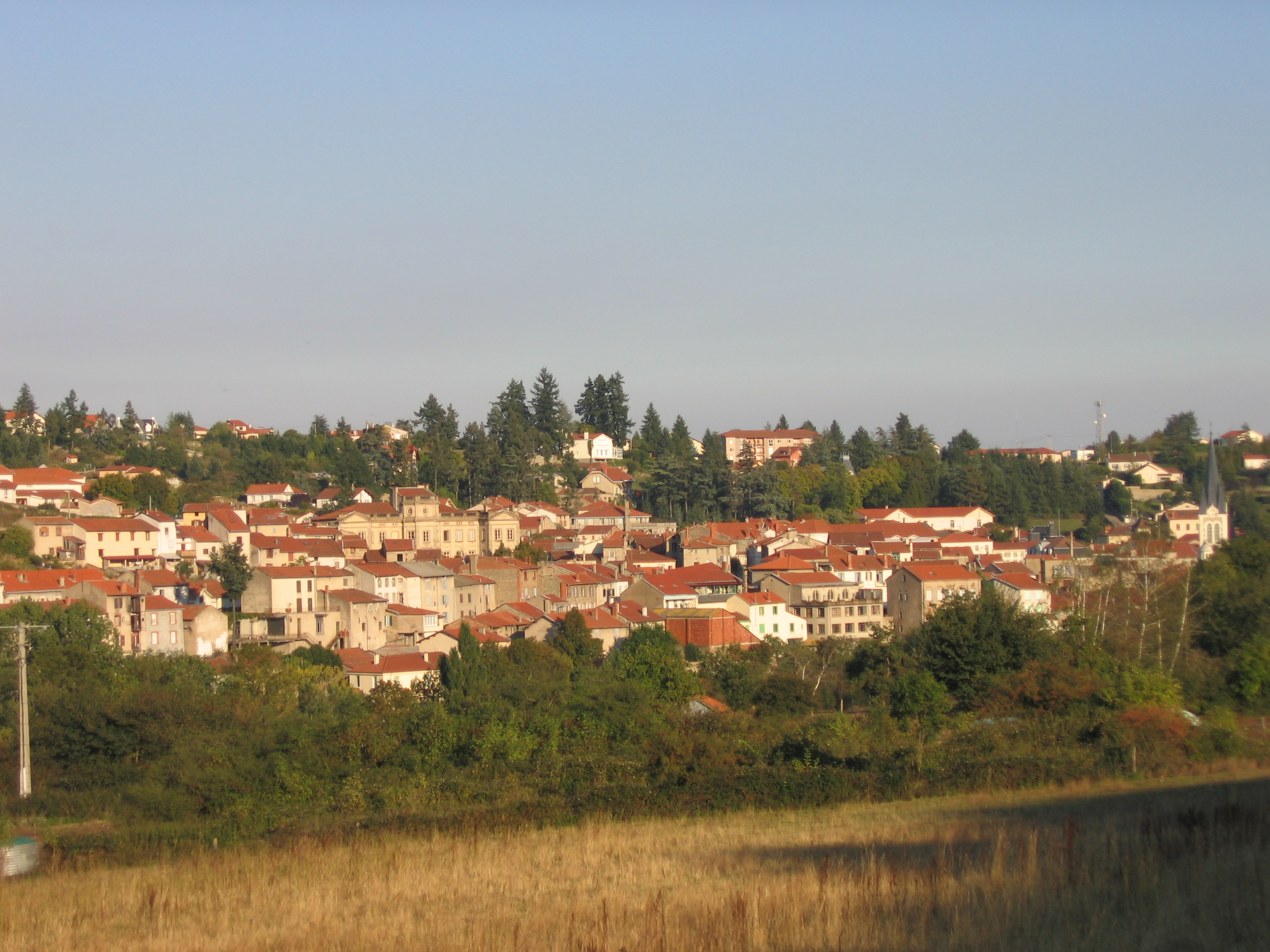 Vue générale de Boën sur Lignon. Auteur Raymond Tarrit